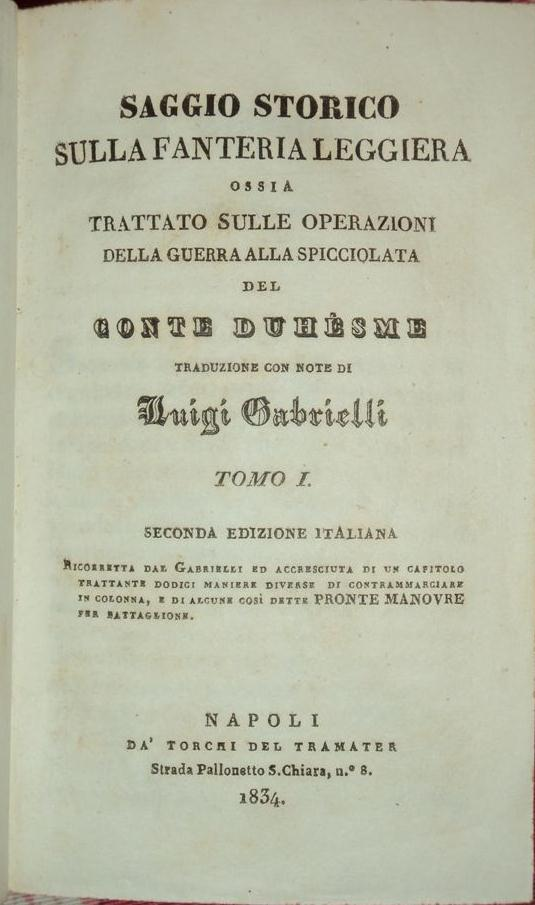 Frontispice de la deuxième édition italienne du Saggio Storico de Duhesme